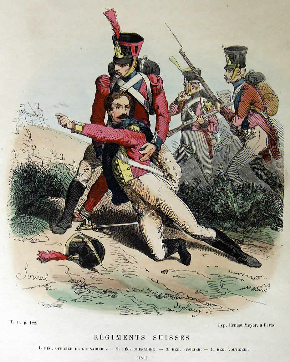 Uniformen von verschiedenen Angehörigen der Schweizer Regimenter in französischen Diensten 1812. (1. Grenadieroffizier, 2. Grenadier, 3. Füsilier , 4. Voltigeur)